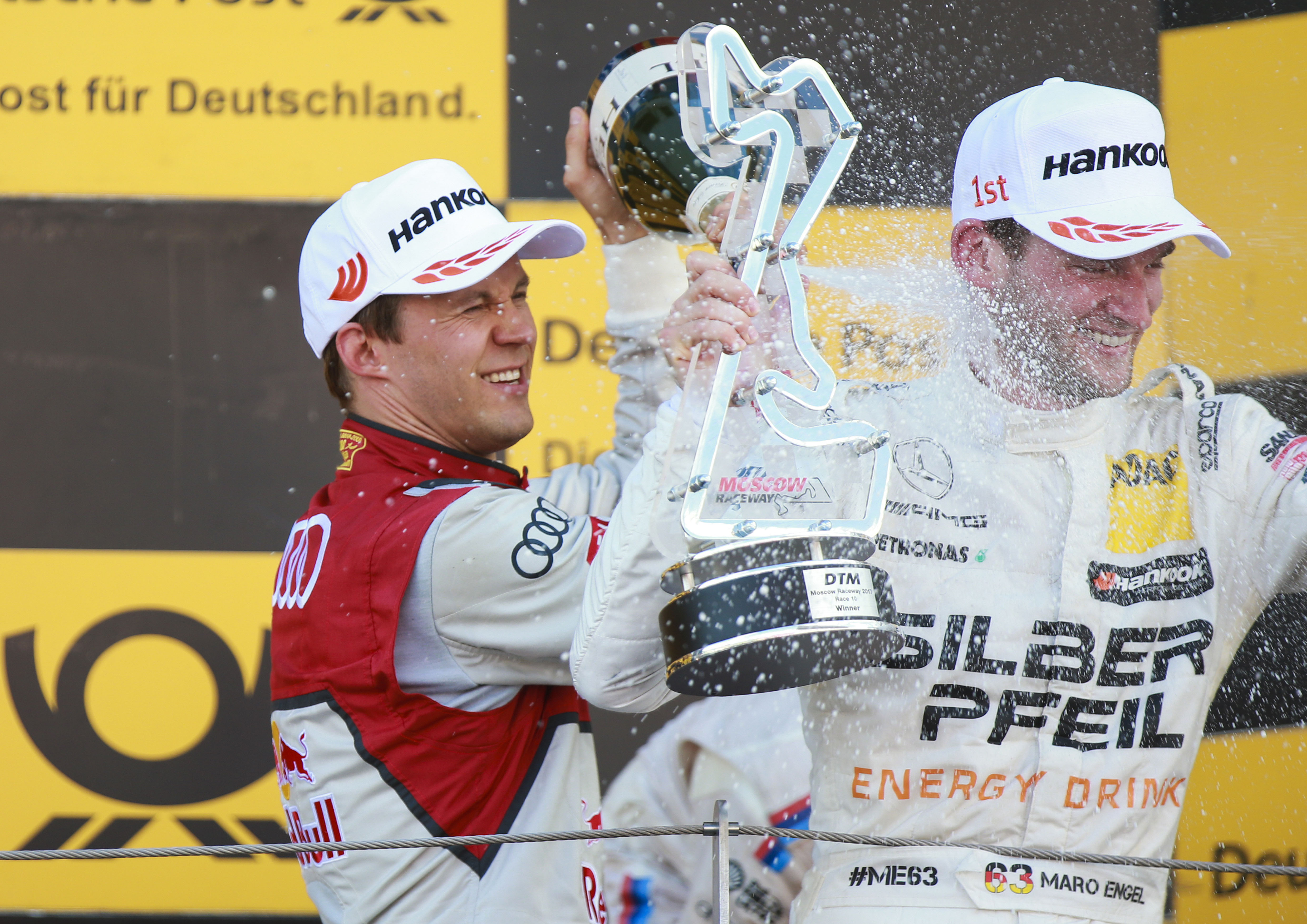 Mattias Ekström, Maro Engel, DTM Moscow 2017